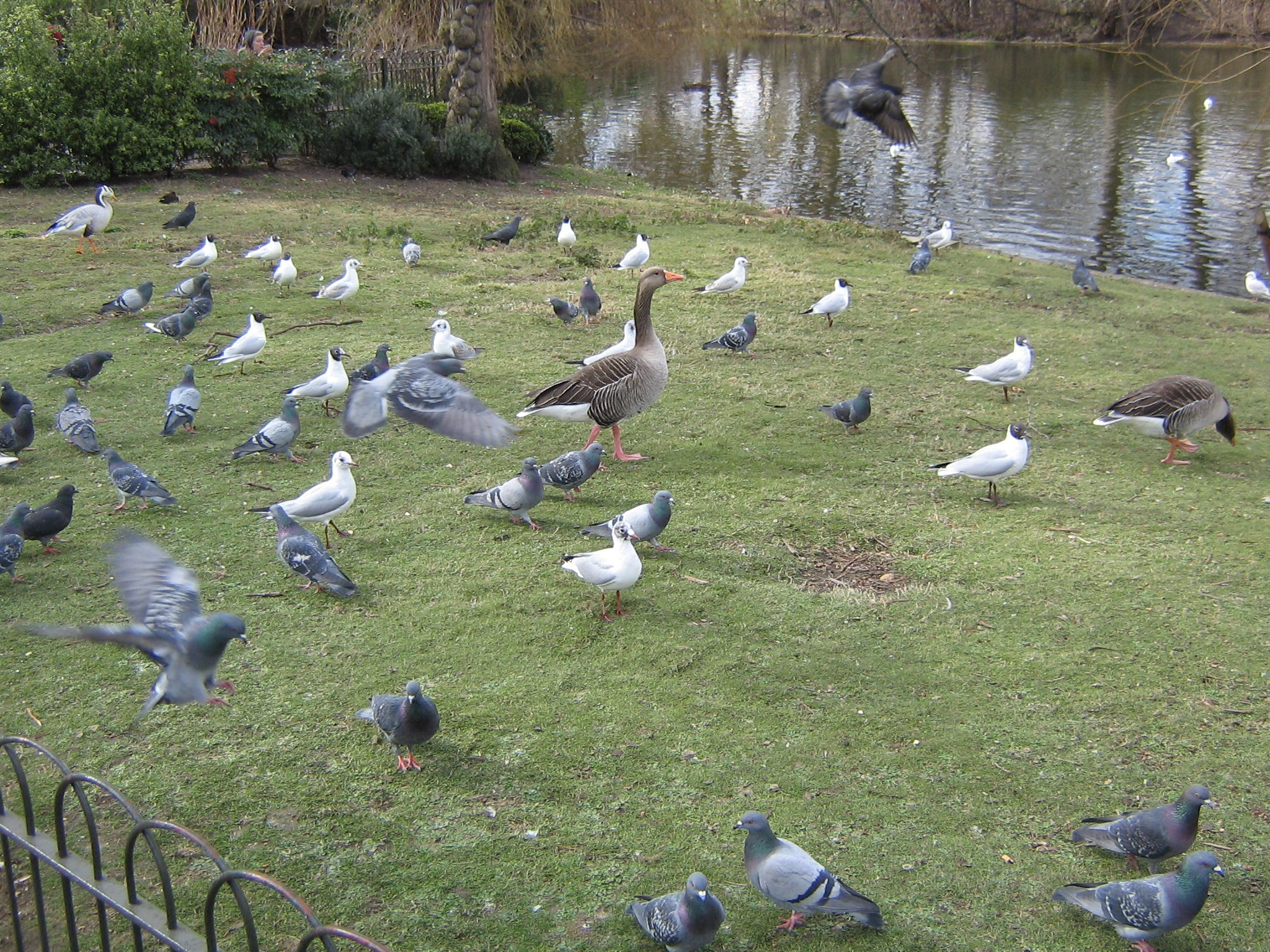 Palomas, ocas y garzas en un parque público de Londres